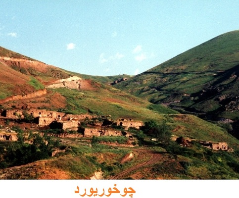 این اثر در تاریخ 1998 از منطقه چوخوریورد شندرشامی اردبیل توسط ناصر محبی عیسی لو گرفته شده است